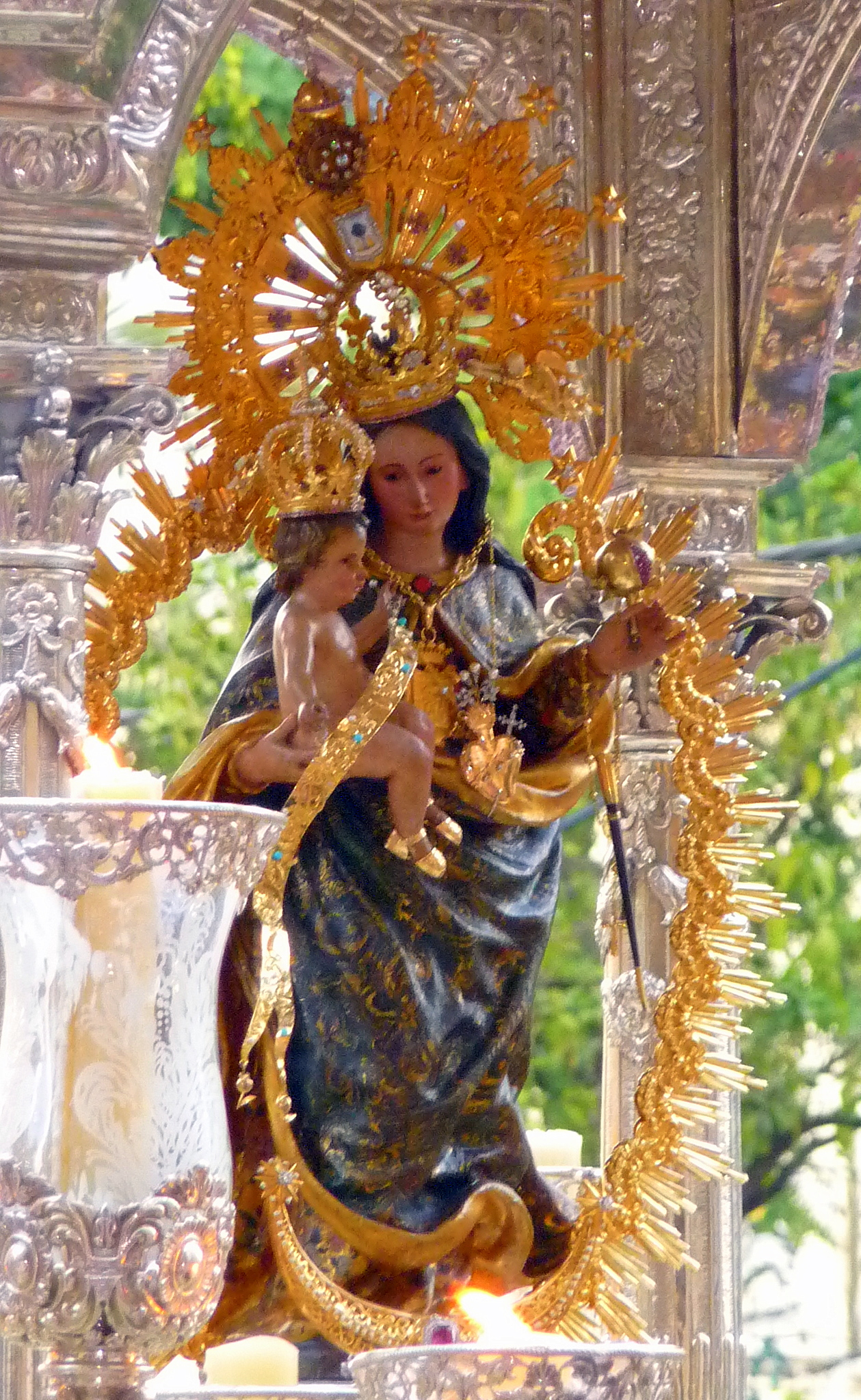 Imagen de Nuestra Señora de La Cinta en salida procesional. Huelva, Andalucía (España).